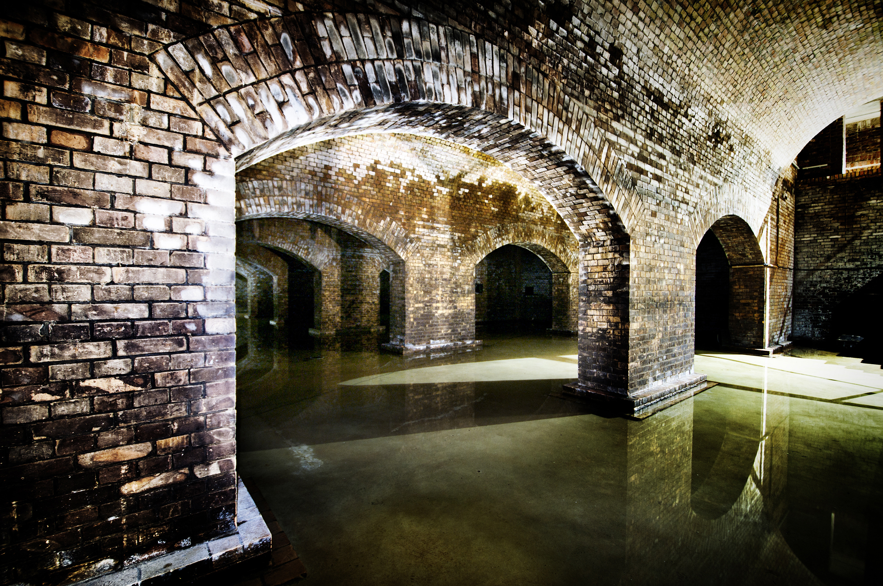 Wasserspeicher der Mathildenhöhe